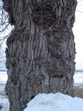 Salix Bark. En pilstam vid Lindesjön. GFDL Photo:user:Damast